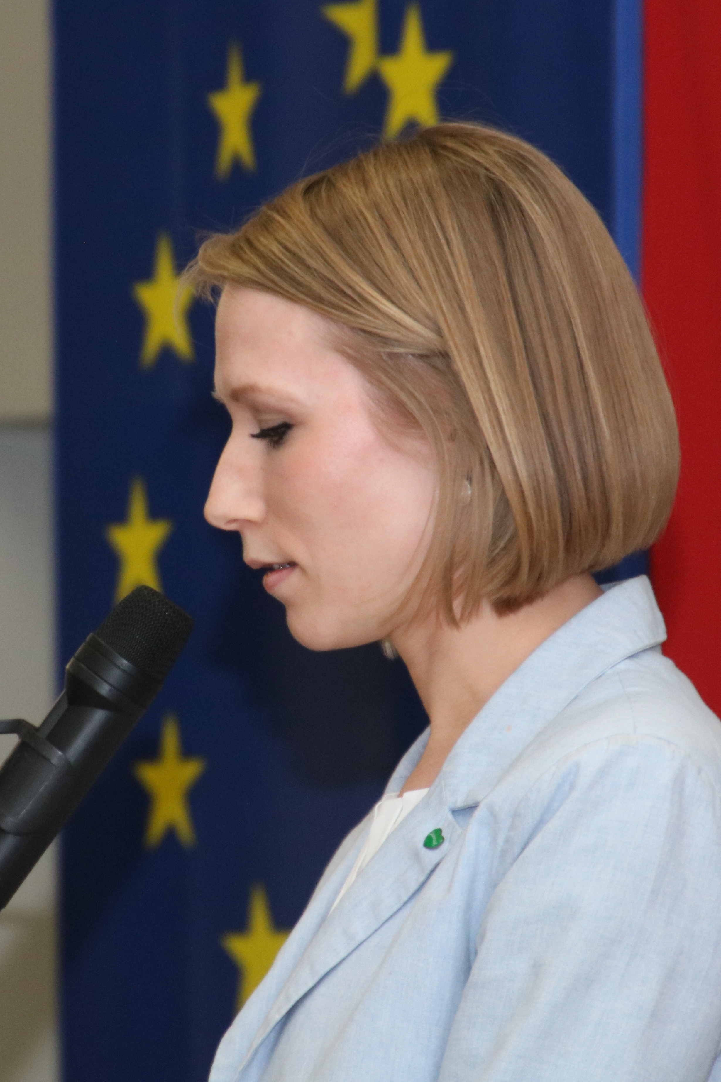 LAbg Julia Majcan beim Neujahrsempfang der Feuerwehren im BFV Radkersburg